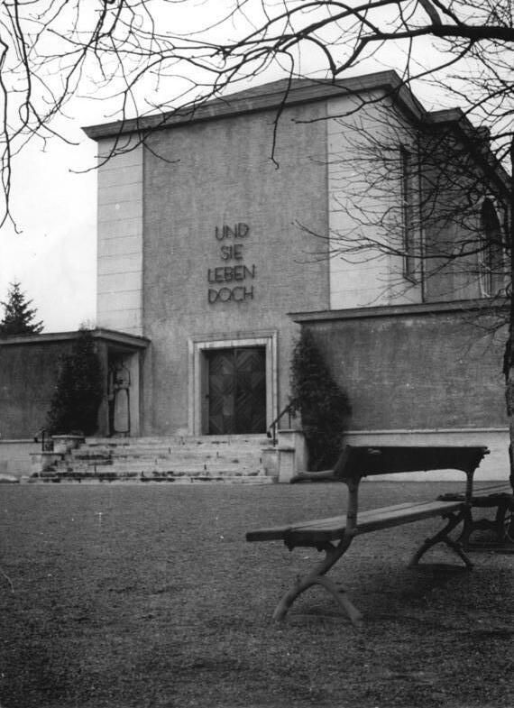 Zentralbild-Weiß St-Qu 4 Mot. 20.11.1954 Feierhalle auf dem Zentralfriedhof. Am Bußtag 1954 wurde auf dem Zentralfriedhof in Lichtenberg, Berlin, die neuerrichtete Feierhalle eingeweiht. UBz Ansicht der Feierhalle (Vorderansicht)